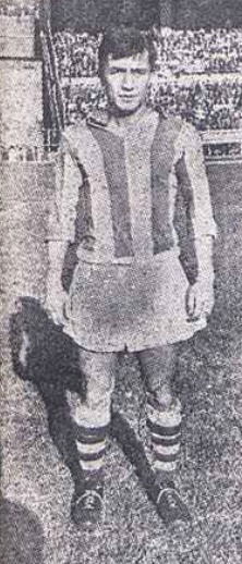 Abdullah Matay, 1950'lerde Fenerbahçe formasıyla